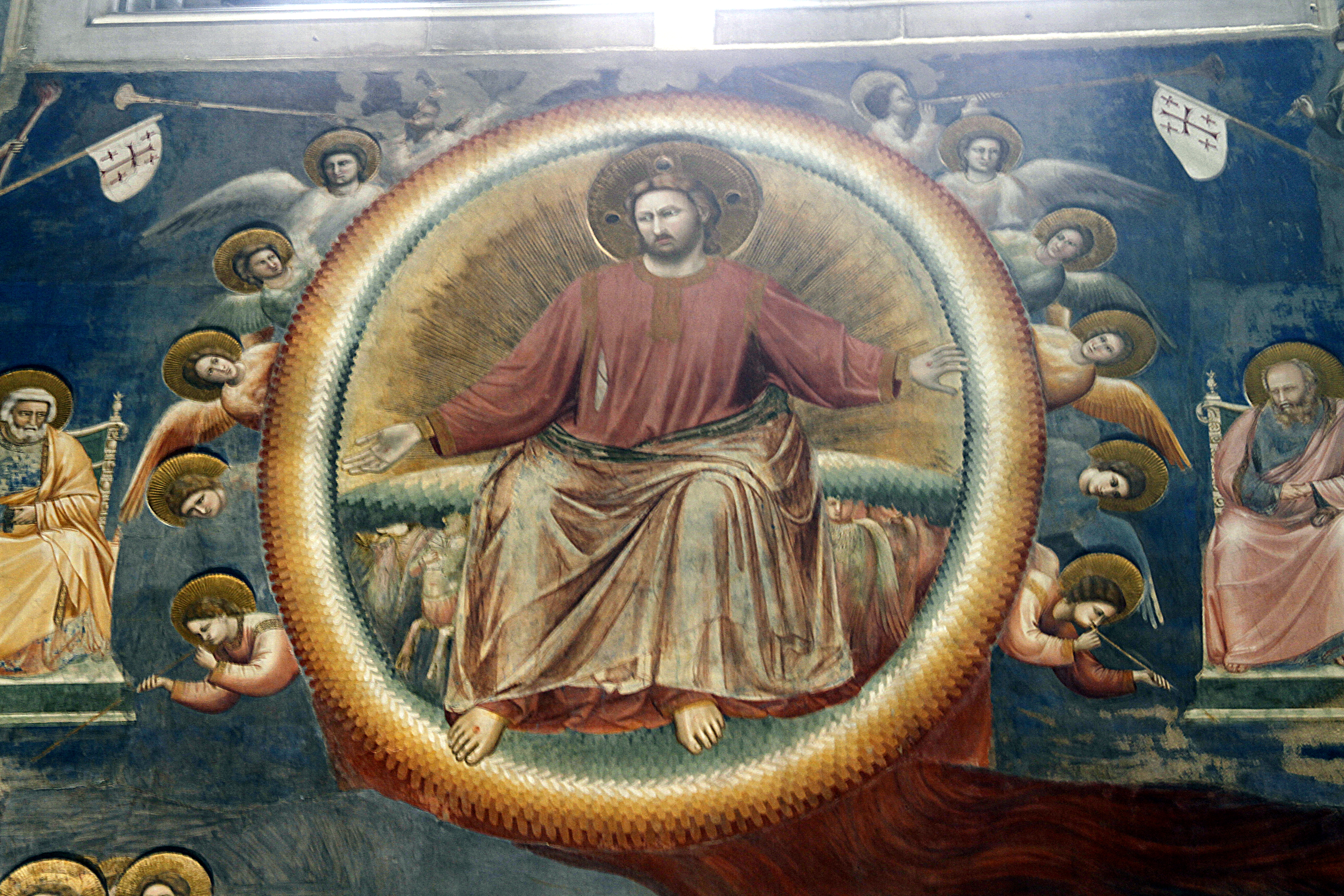 Capella dei Scrovegni - Padua